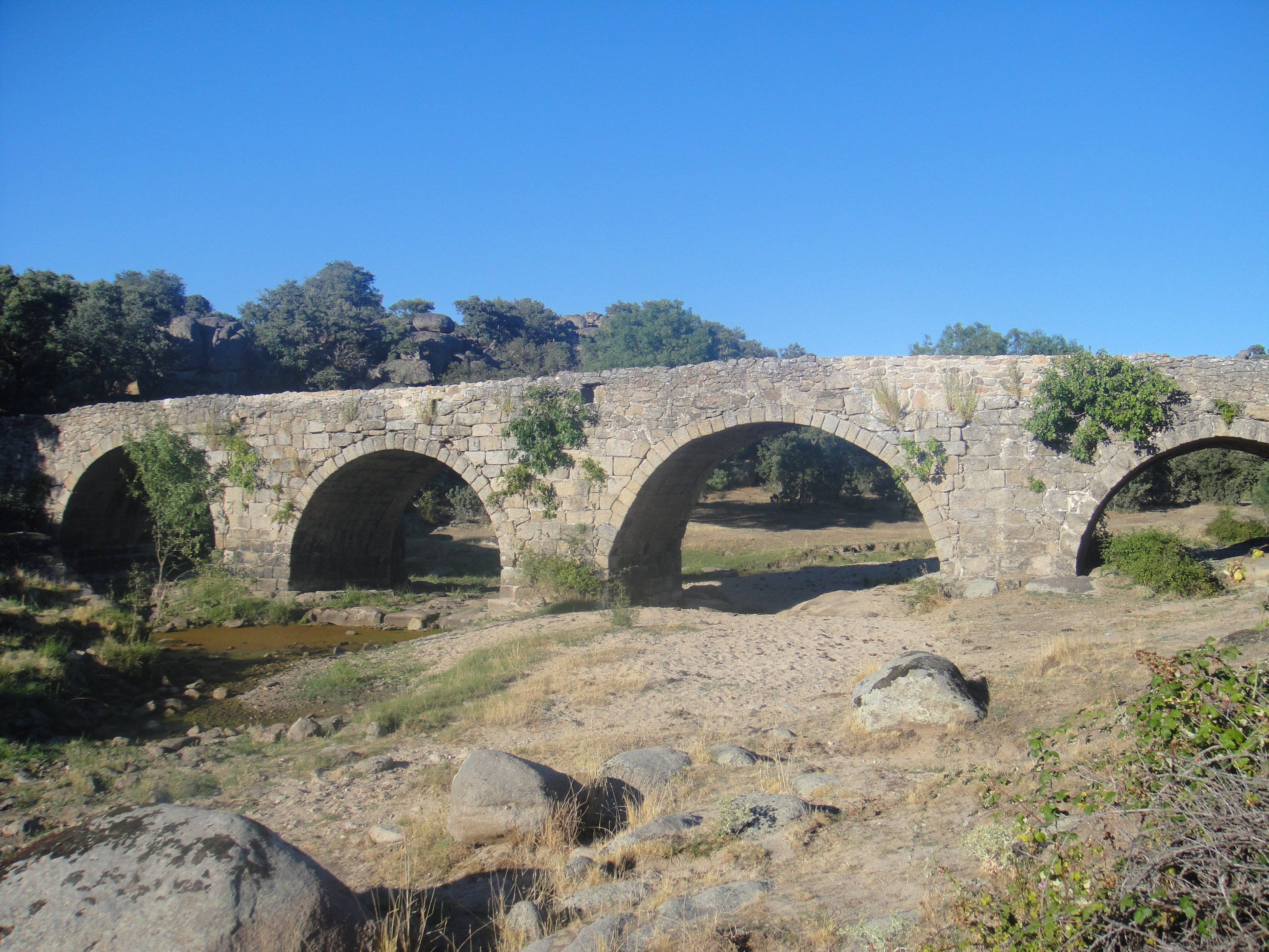 Puente Mocho de Ledesma. Es un puente romano de la época de Augusto, reconstruído en parte en la Edad Media. Se encuentra en la provincia de Salamanca, (España).